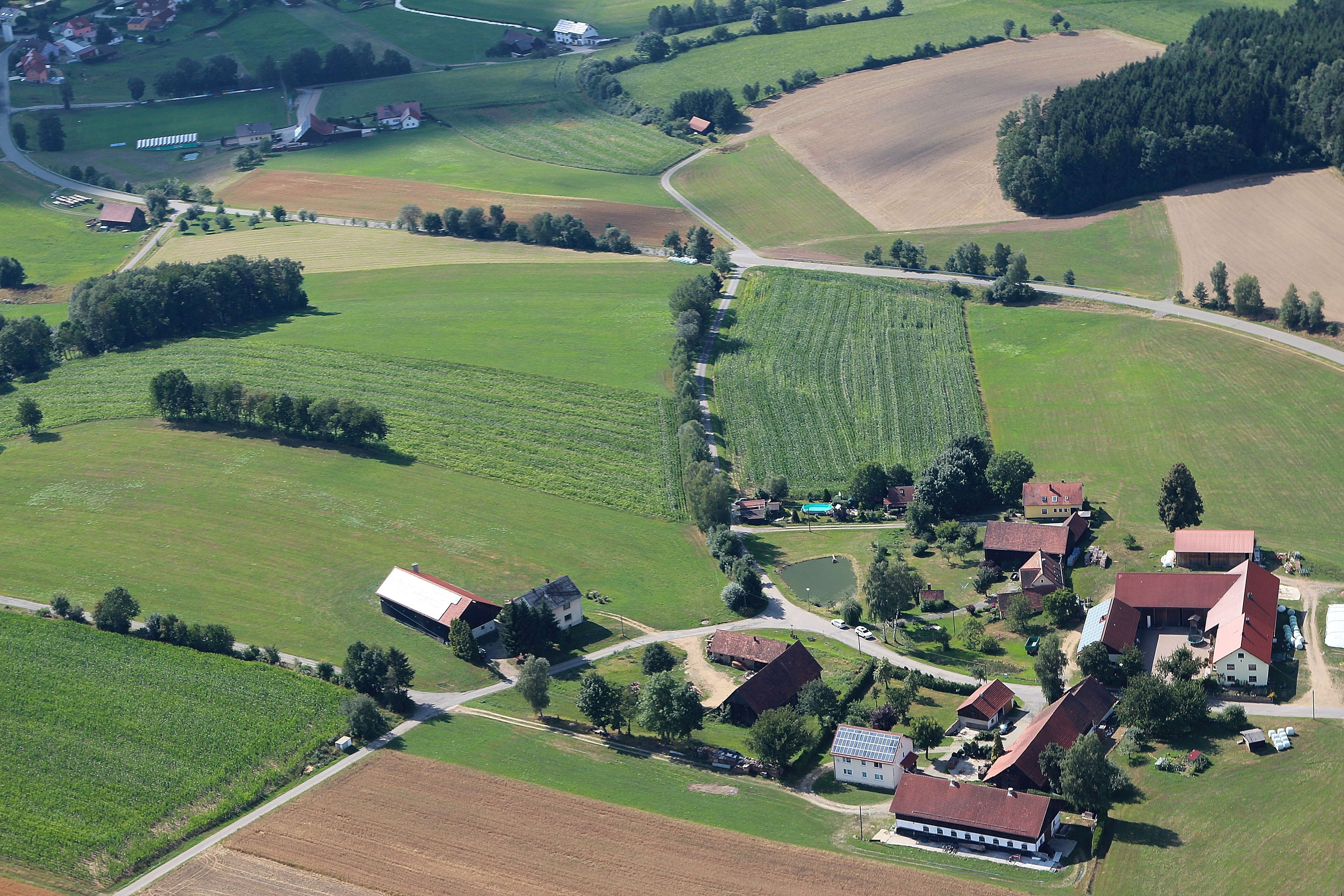 Braunsried bei Pertolzhofen, Gemeinde Niedermurach, Landkreis Schwandorf, Oberpfalz, Bayern